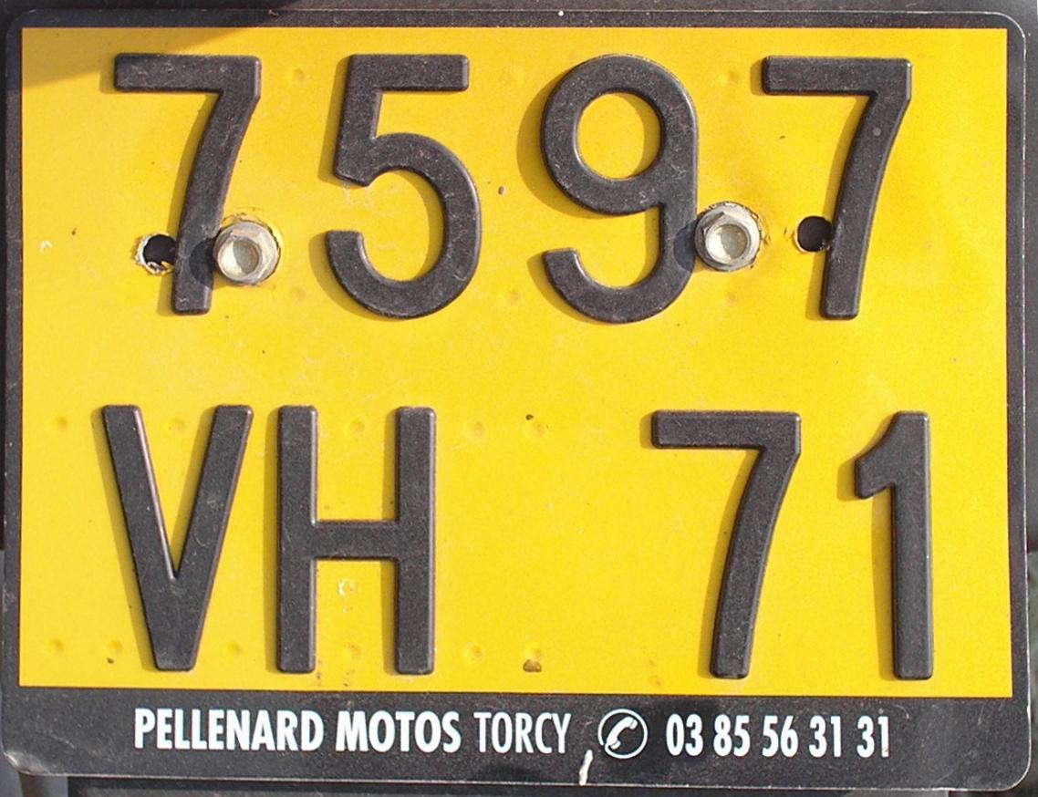 Номерний знак